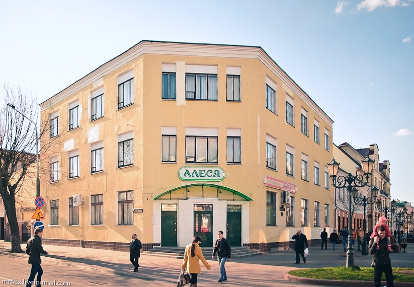 Брэст. Савецкая вуліца